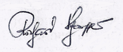 Richard Schaeffler. Signatur seines Briefes an mich vom 23.12.1996